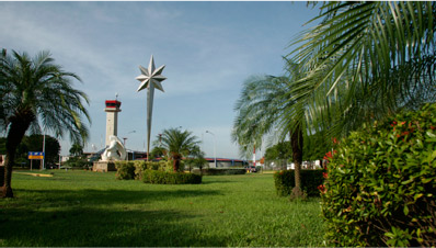 Aeropuerto Internacional La Chinita